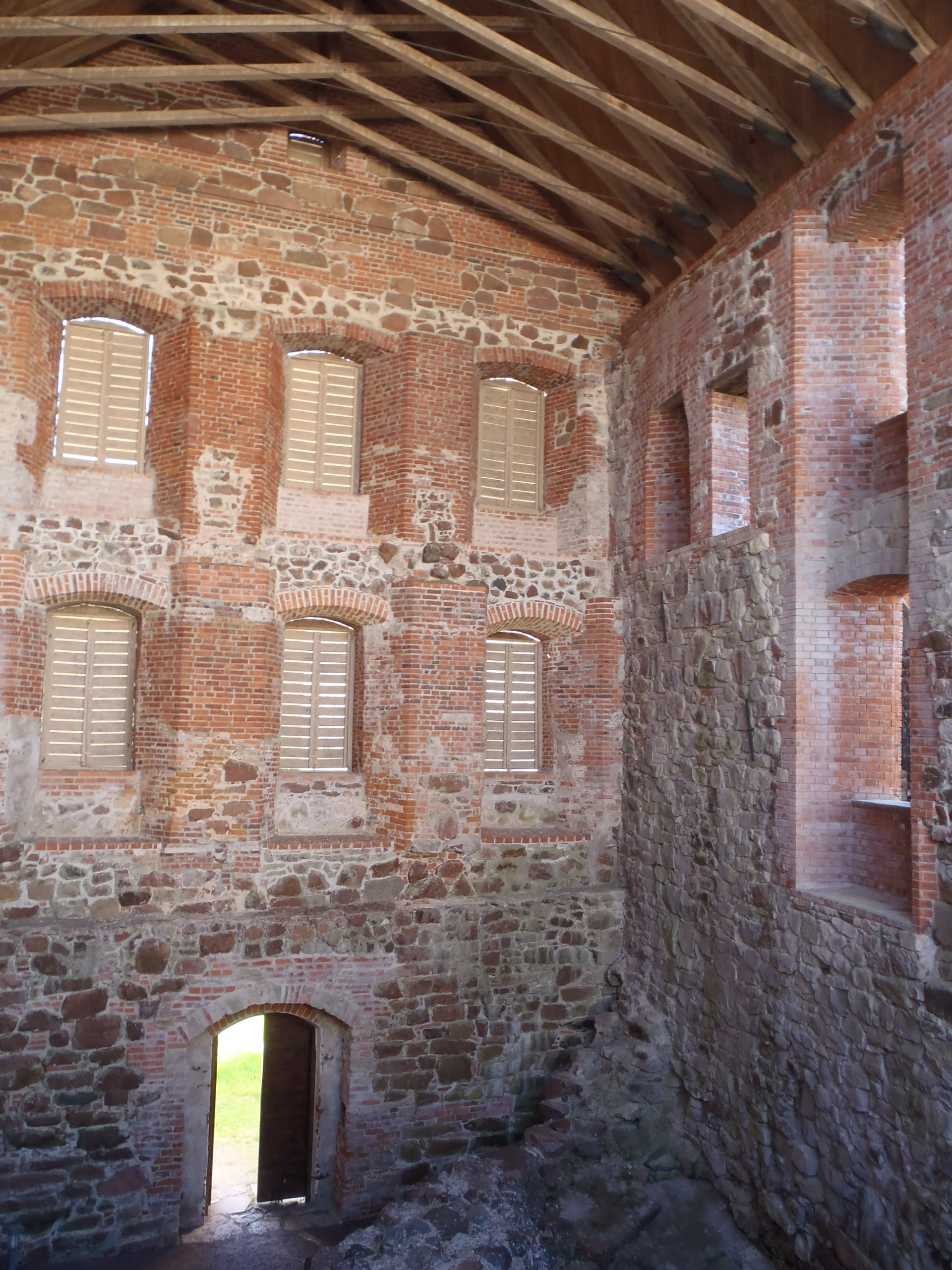 Kastelholms slott, den 4 augusti 2012.